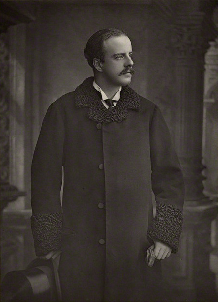 Alexander William George Duff, 1. Herzog von Fife